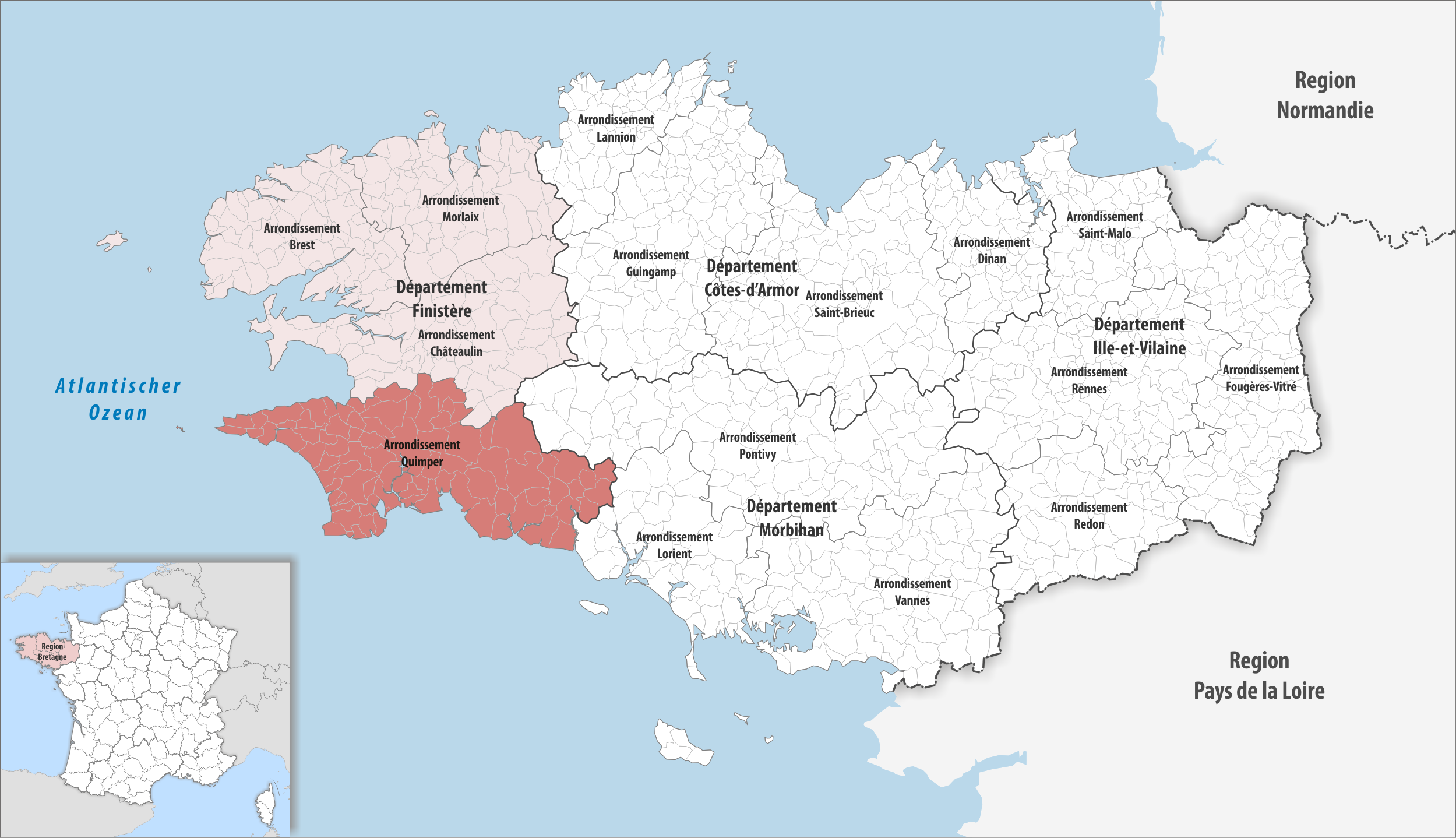 Lage des Arrondissements Quimper